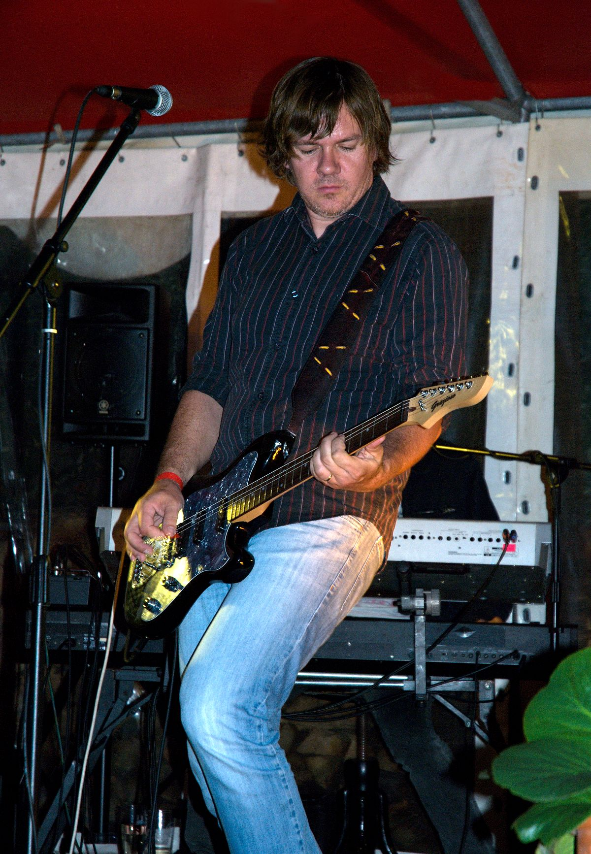 Michal Hrůza